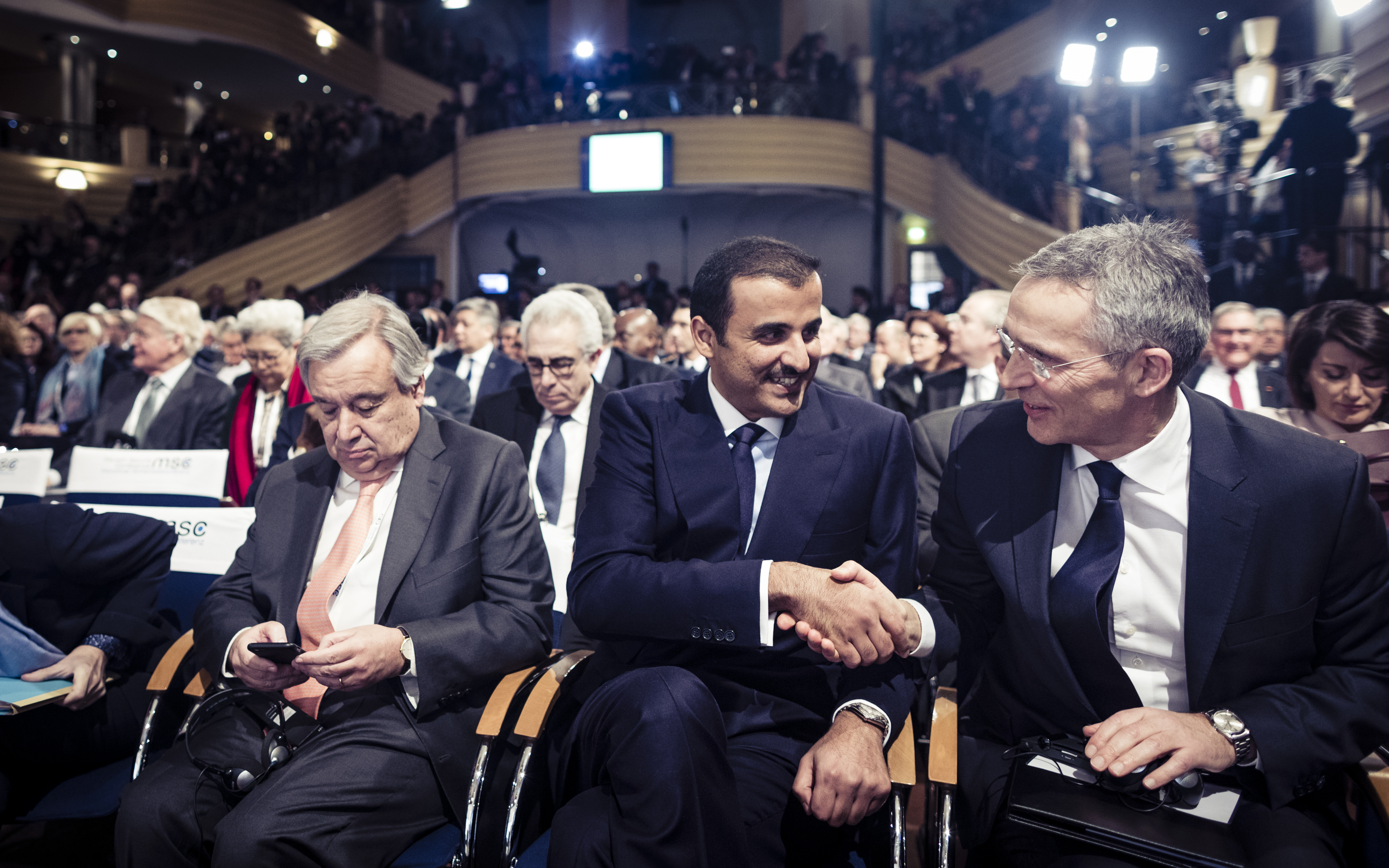 António Guterres, Sheikh Tamim Al-Thani und Jens Stoltenberg während der Münchener Sicherheitskonferenz 2018